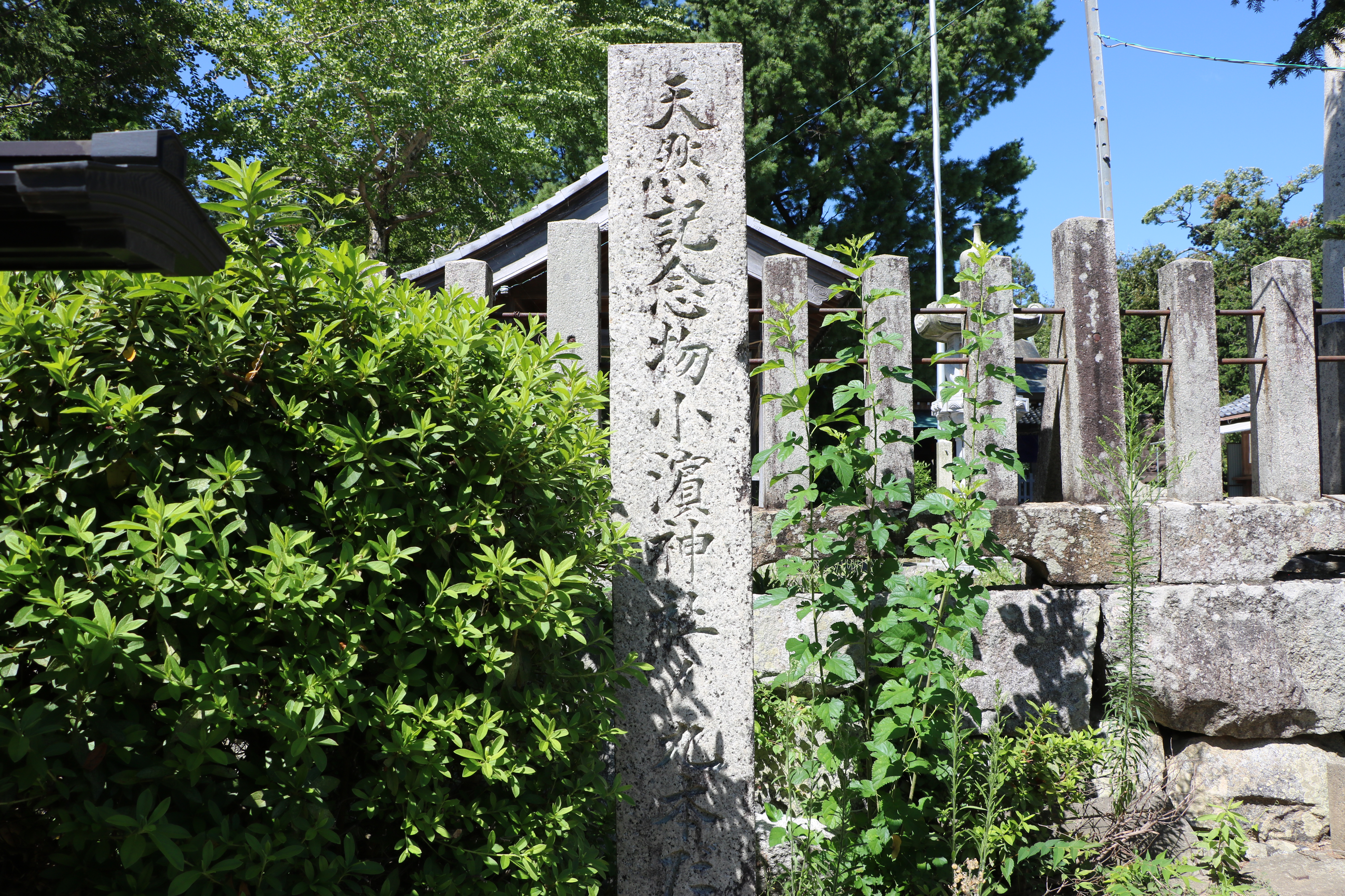 小浜神社の九本ダモ国指定天然記念物石碑（指定は解除済み）福井県小浜市